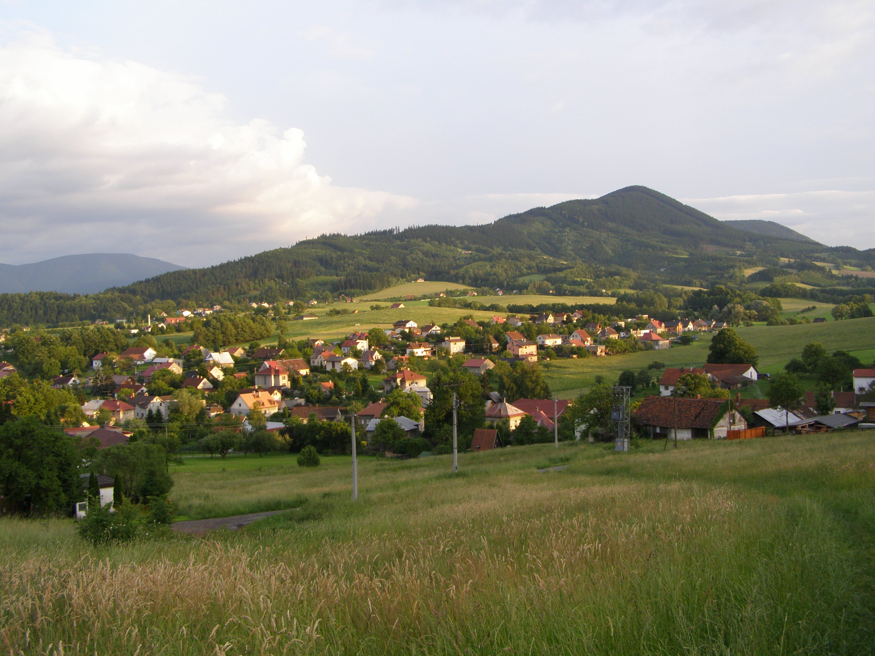 Česky: Metylovice, pohled z lokality Lišky na severní stranu vrcholu Ondřejník (890 m)